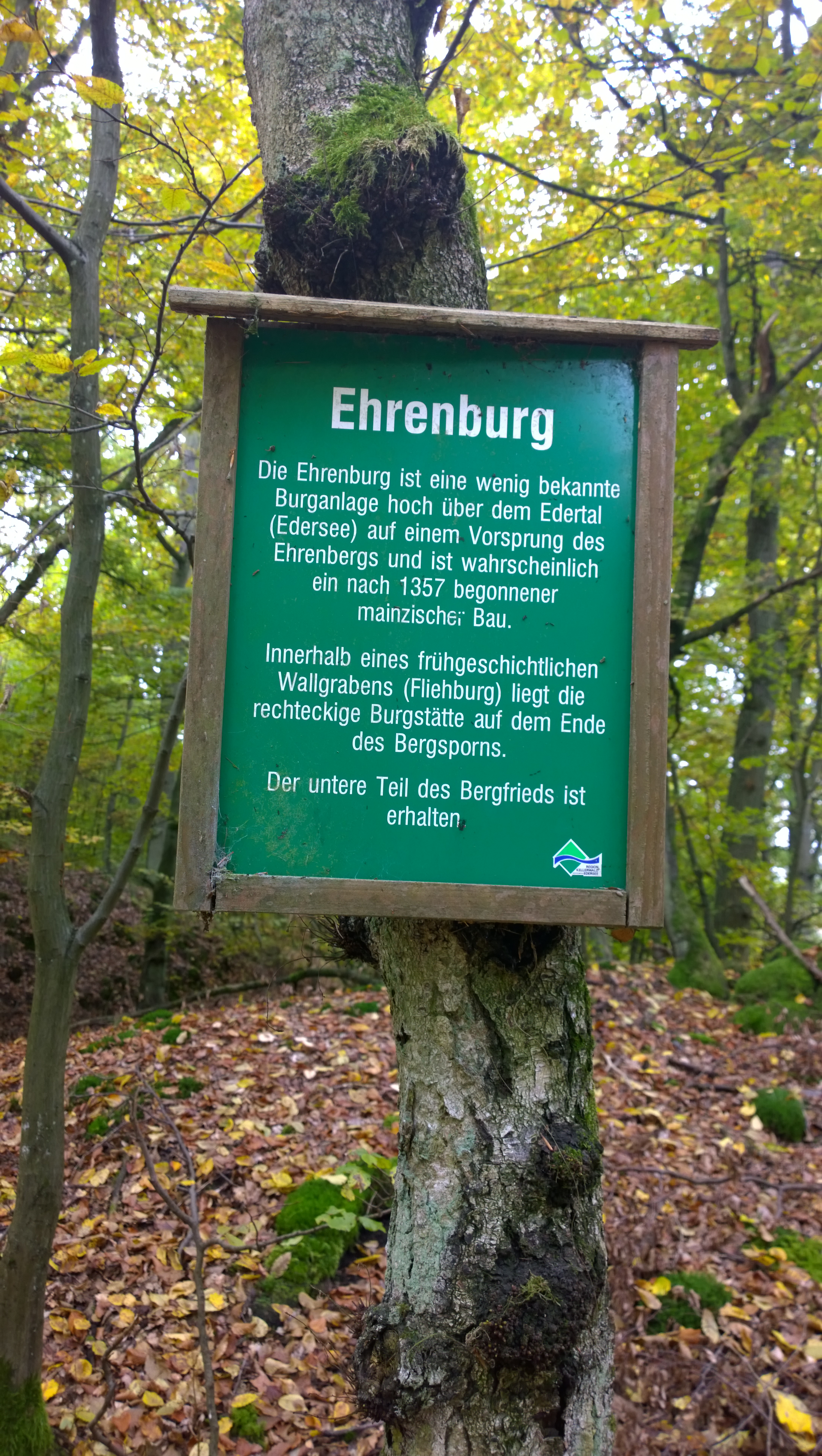 Informationstafel am nordnordwestlichen Burgende (Spornseite)